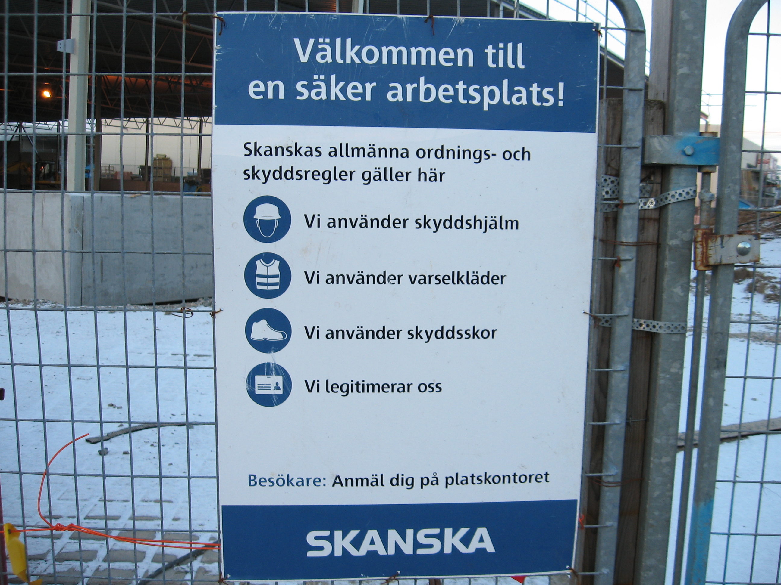 En Skanskaarbetsplatsskylt i Lund.